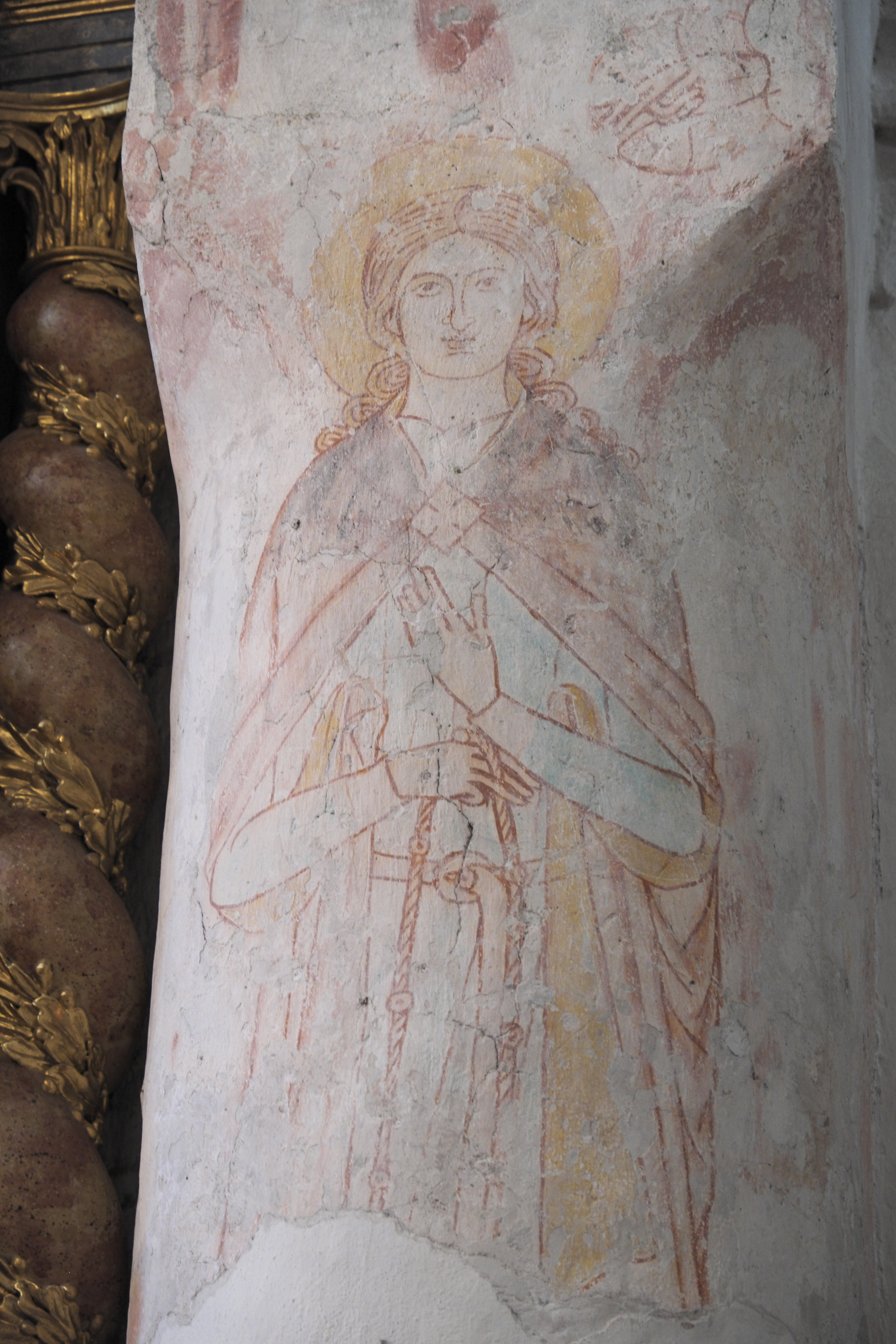 Katholische Abtei- und Kuratiekirche Mariä Opferung des Benediktinerinnenklosters Frauenchiemsee auf der Fraueninsel im Landkreis Rosenheim (Bayern/Deutschland), romanische Fresken